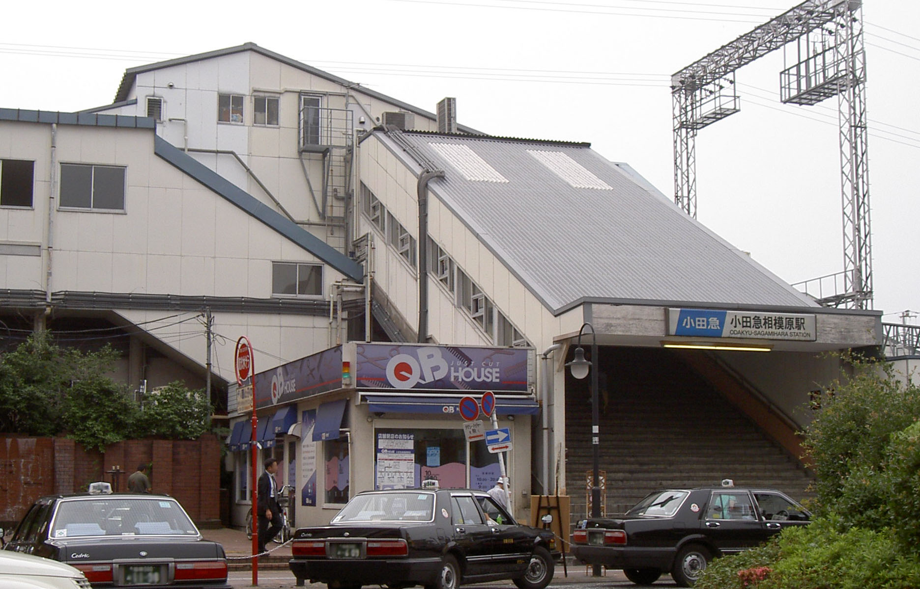 Odakyu-Sagamihara station of Odakyu Odawara line ja: 小田急相模原駅南口